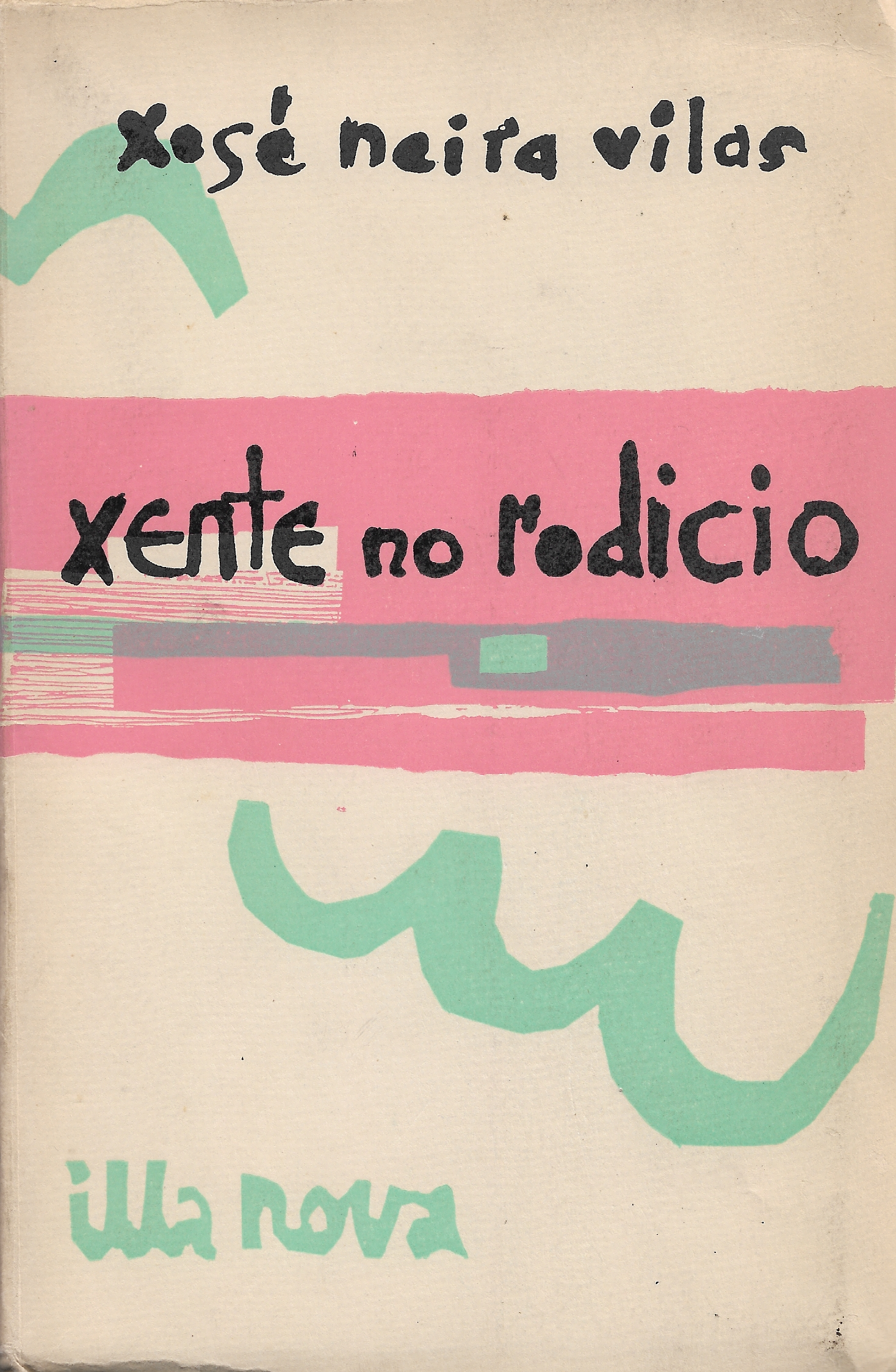 Portada da primeira edición de 'Xente no rodicio' de Xosé Neira Vilas (Edicións Galaxia, 1965)